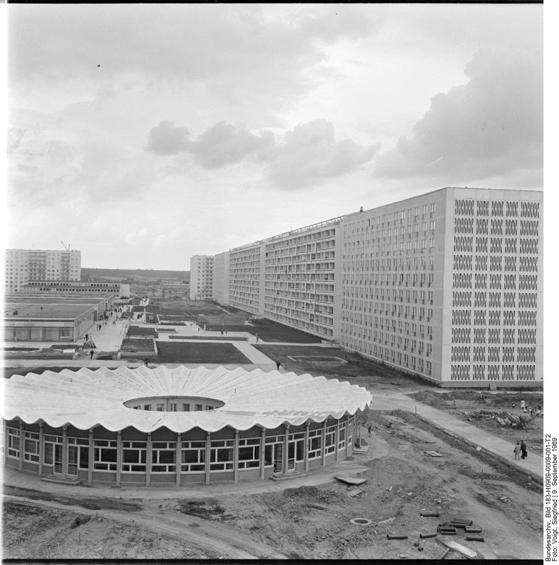 Zentralbild / Voigt / 9.9.69 / ku / Halle-Neustadt: Die junge Stadt Halle-Neustadt mit 25.000 Einwohnern und 9.000 Wohnungen hatte im Juli den 5. Jahrestag der Grundsteinlegung und den 2. Jahrestag der Verleihung der Stadtrechte. Unser Panorama zeigt in der Bildmitte den interessanten Delta-Kindergarten, der nach einer neuen Bauweise errichtet wurde. Information added by Wikimedia users."Block 10", später Block 618 bis 621, Adresse heute: Zerbster Straße 25-43, 06124 Halle (Saale). Originale Beschreibungen von Bild 183-F0802-0013-001: "...die Montage des längsten Wohnblocks der DDR am 31.7.67 beendet. Das 385 m lange zehngeschossige Gebäude wuchs in rund sechs Wochen empor. Die Montage-Arbeiter verbauten dabei 23000 Elemente im Gesamtgewicht von 100000 Tonnen. Der Wohnriese bietet in 320 Mehrzimmer- und 536 Einraumwohnungen Platz für rund 2000 Menschen. Ein Dachgarten wird noch angelegt; einige Räume werden zu einer Kinderkrippe mit 160 Plätzen ausgebaut. Beim Bau des Blocks hat sich das Kiewer Beispiel ausgezeichnet bewährt." Im Vordergrund der 1968 erbaute kreisförmige Deltakindergarten "Buratino", dessen Dach aus den von H. Müller entwickelten Delta-HP-Schalen besteht. Der Begriff 'Delta' bezieht sich auf den konischen Verlauf der Betonschalen.